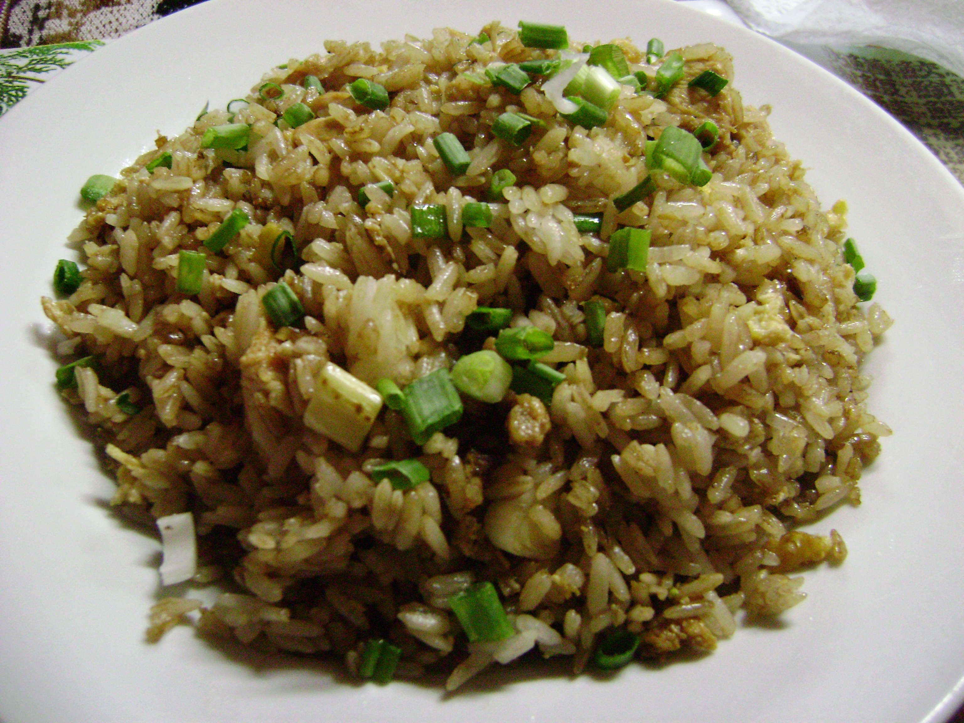 Arroz chaufa de carne. Chiquián, Perú